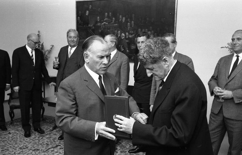 Überreichung des Großen-Bundes-Verdienstkreuzes mit Stern an MdB Dr. Kopf durch Bundestagspräs. Dr. Gerstenmaier